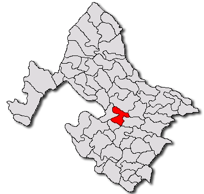 Categorie:Hărţi ale judeţului Mehedinţi